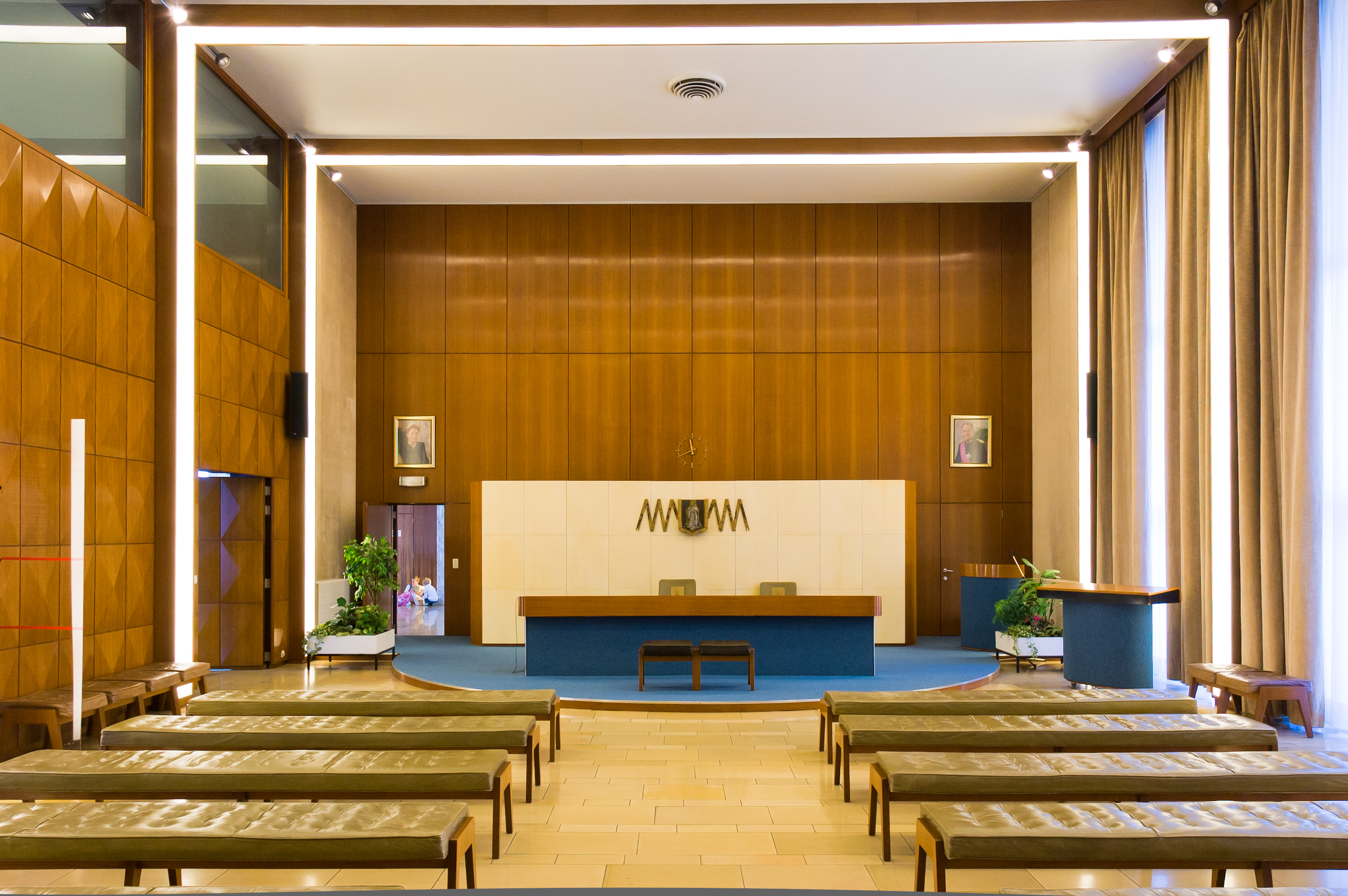 Trouw- en raadzaal van het districtshuis Merksem. Binnenhuisarchitect Jan Van Puyvelde realiseerde een 'moderne' inrichting voor de trouw- en raadzaal die de idee van een ceremoniële macht en rijkdom uitstraalt. Houten diamantkoppen staan er garant voor.